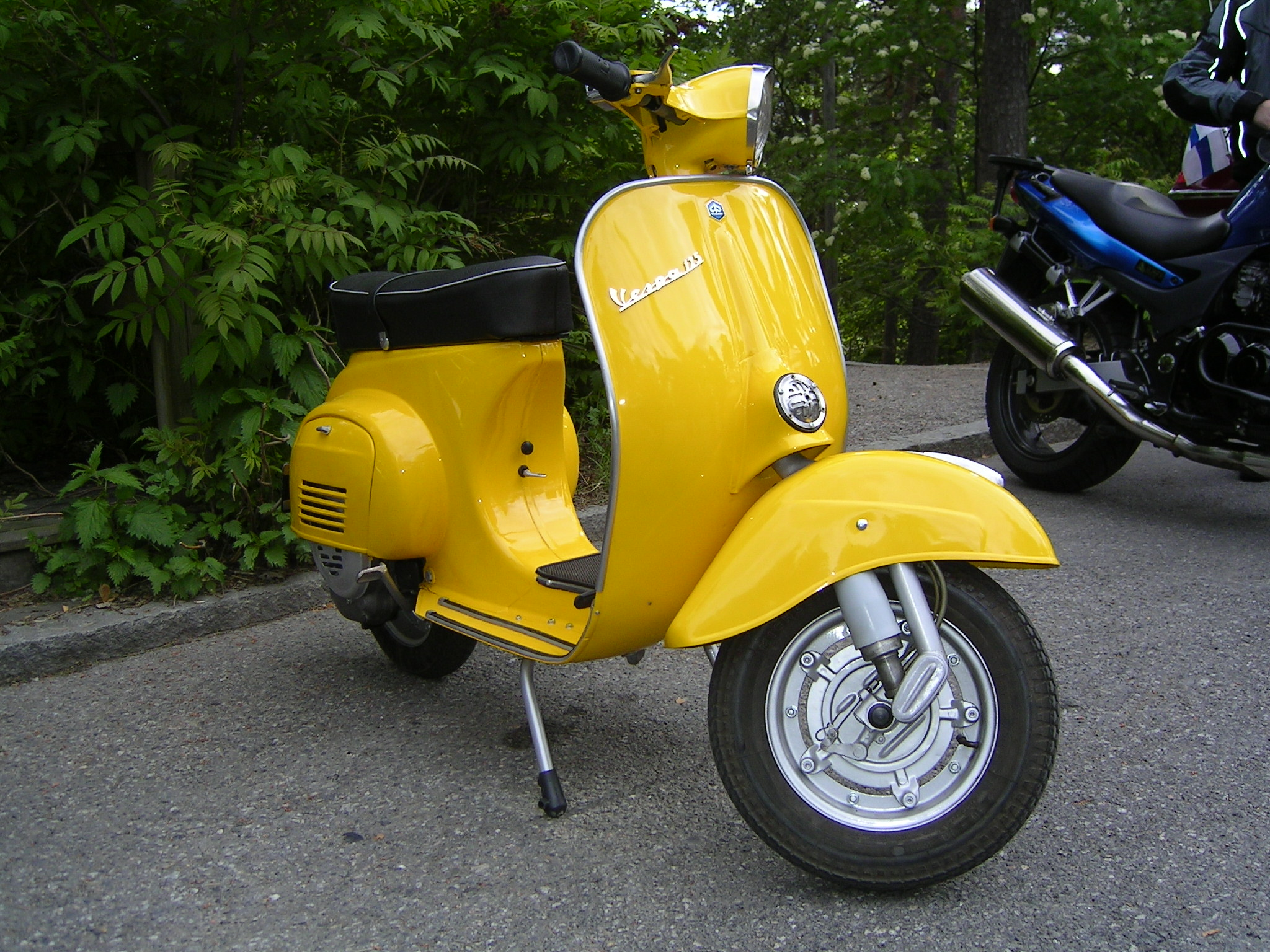 Piaggio's Vespa Primavera, a small frame Vespa model, with 125cc engine.